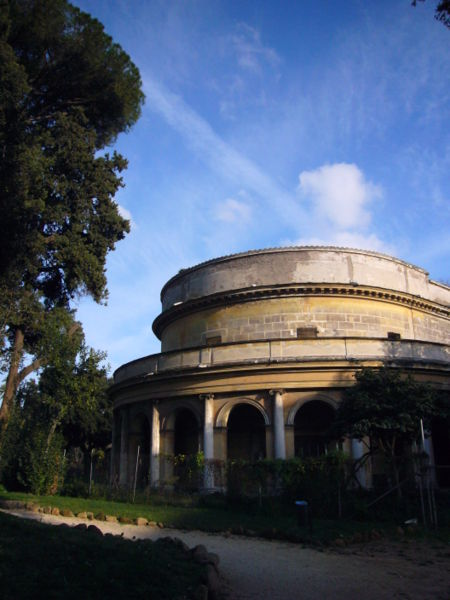 Il Teatro, Villa Torlonia in Rome. By